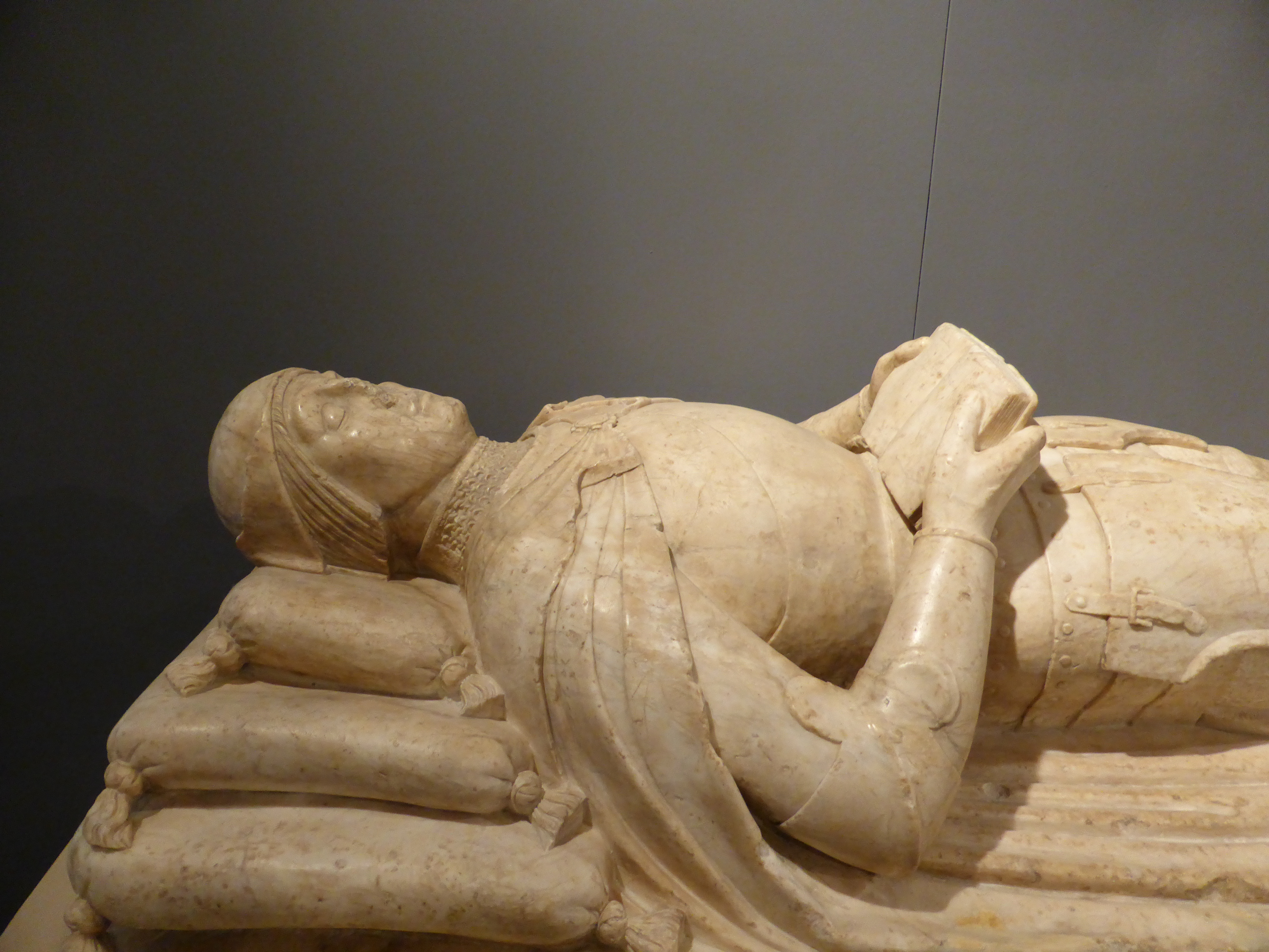 Escultura yacente, en alabastro, del capitán artillero Francisco Ramírez de Madrid. Cenotafio (sepulcro vacío) conservado en el Museo de San Isidro (Madrid), procedente del antiguo convento de la Concepción Francisca. Este cenotafio debe fecharse hacia 1531, cuando habían pasado 30 años de su muerte. El monumento funerario fue encargado por su segunda mujer, Beatriz Galindo ("La Latina"), junto con otros cenotafios.